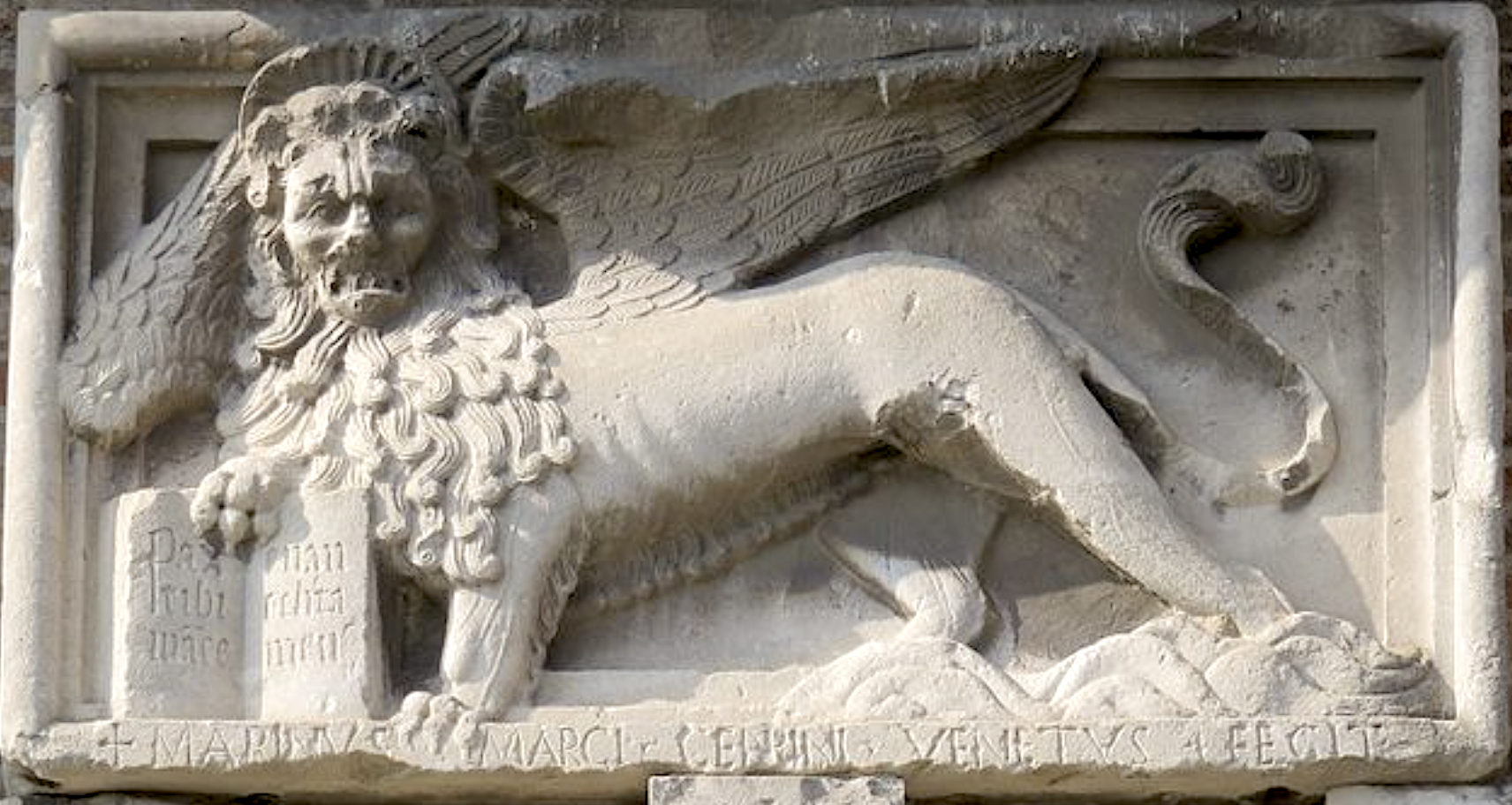 lion ailé de Marino di Marco Cedrino